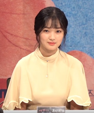 MBC 수목드라마 어쩌다 발견한 하루 제작발표회 김혜윤